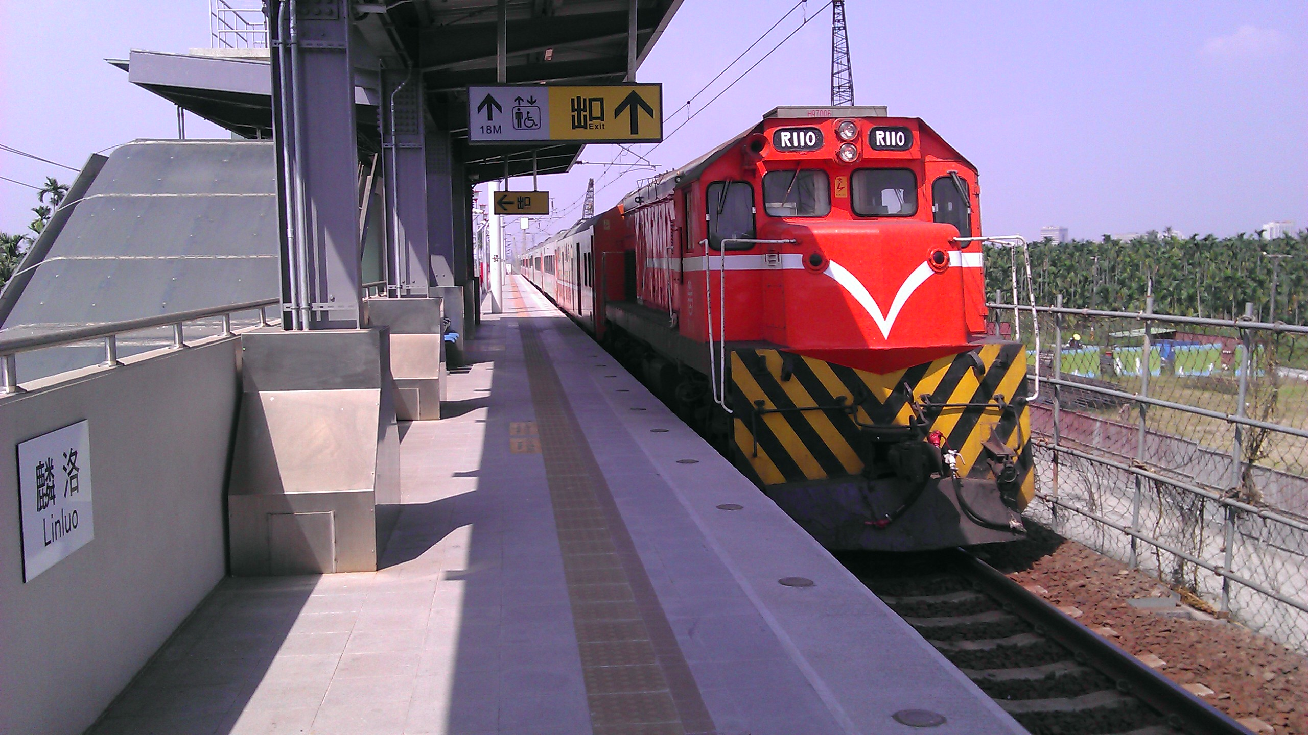 臺鐵屏東線高架化後的麟洛車站第二月台之一景。此觀景方向為北上方向。柴電機車R110牽引一列南下莒光號列車，正通過此站第二月台邊。順帶一提，若列車經過，則地上之警示燈會閃爍，並且會有「各位旅客，第二月台將有列車通過，敬請不要靠近月台邊，以免發生危險」之播音，以提醒旅客之安全。